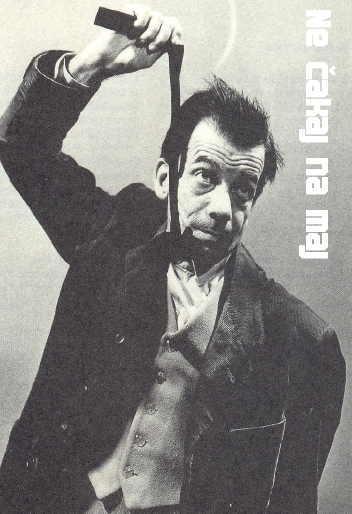 Reklamni poster za film Ne čakaj na maj.